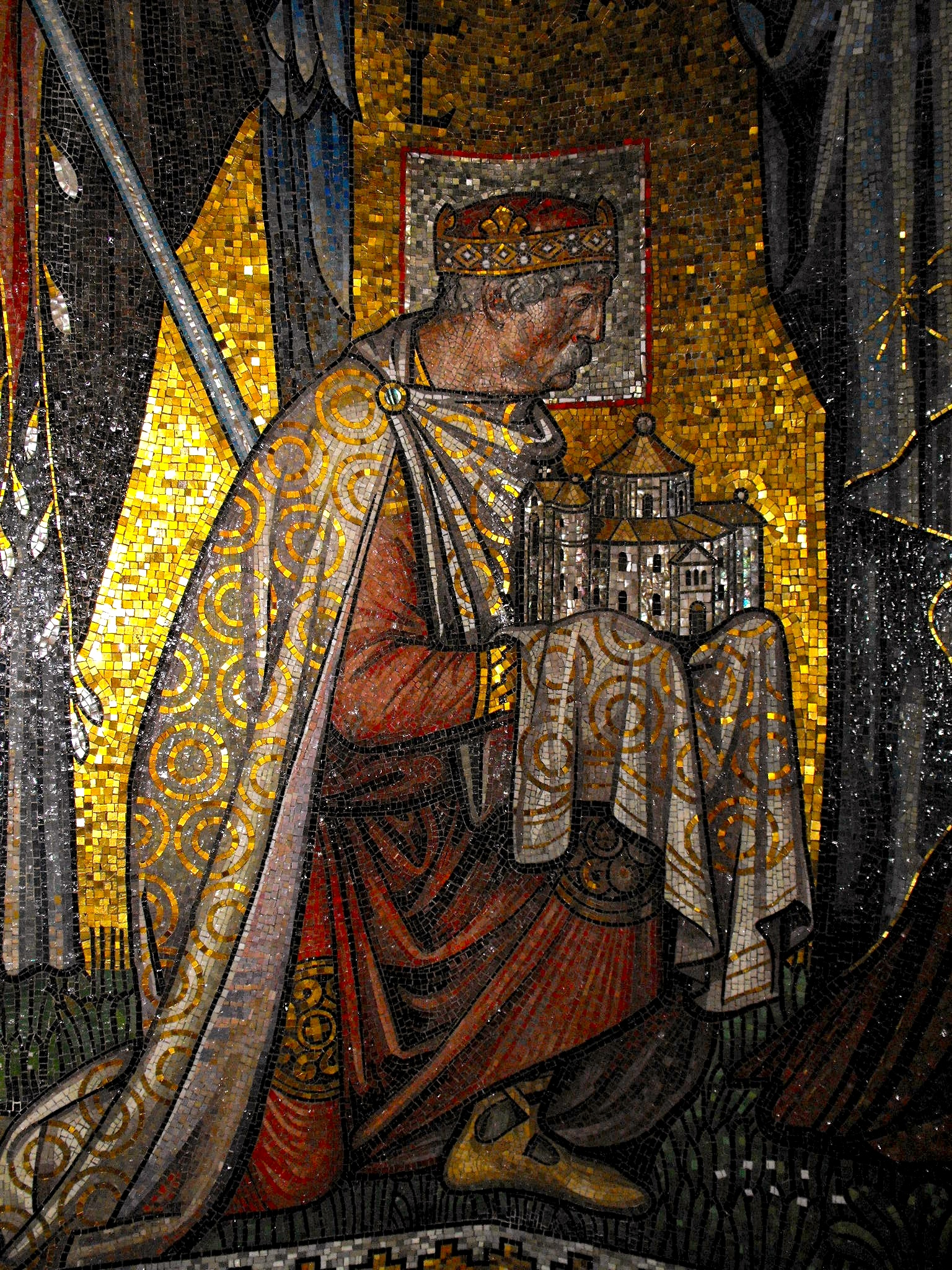 Detail des Kuppelmosaiks des Aachener Doms: Kaiser Karl (mit dem Gesichts Otto von Bismarck) mit der Pfalzkapelle; Zustand nach der Restaurierung, Sommer 2011